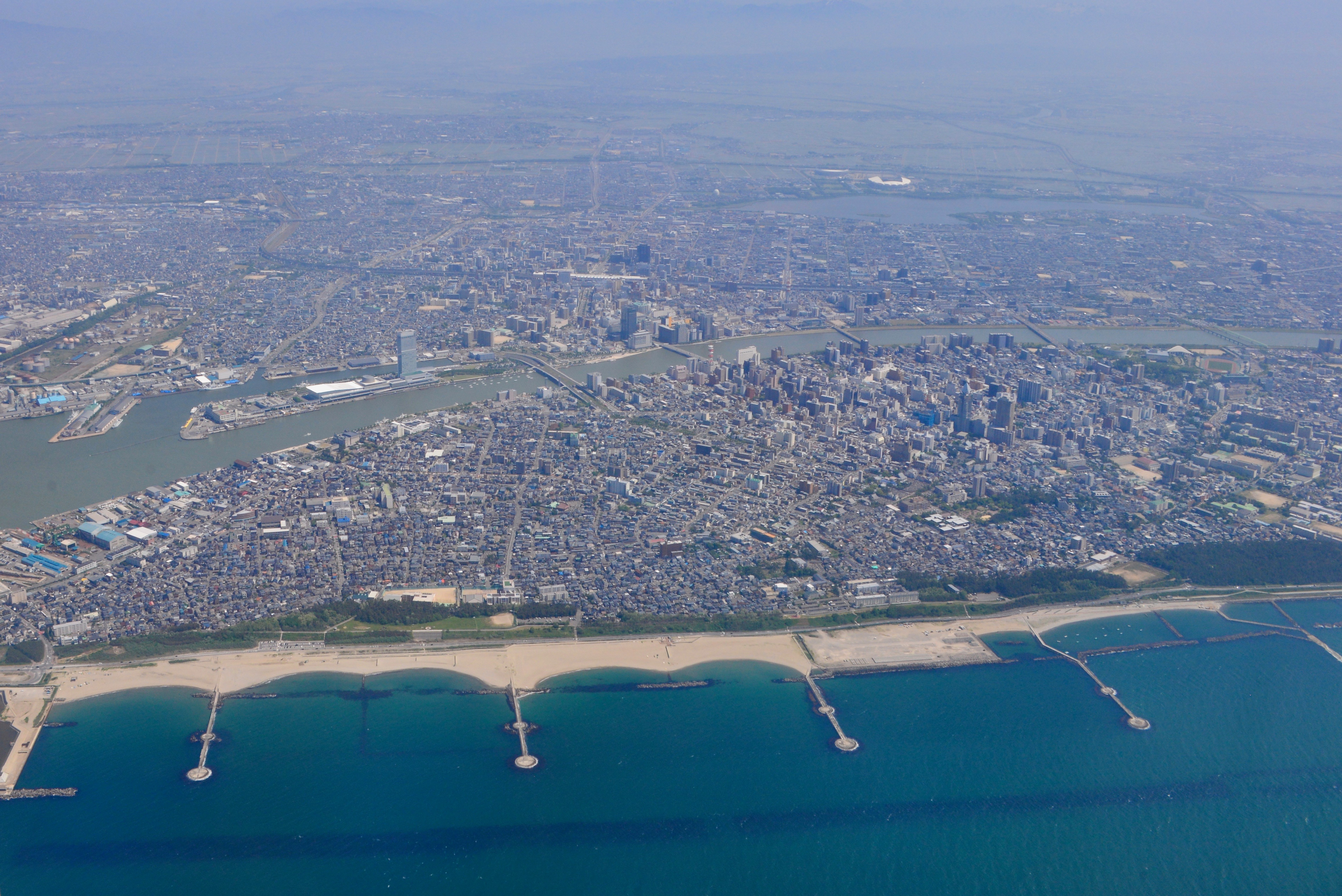 新潟市上空。新潟空港から離陸する機内より撮影